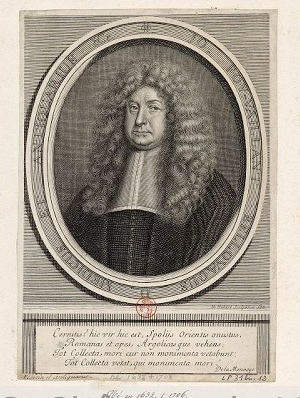 Jean Foy-Vaillant (1632-1706)